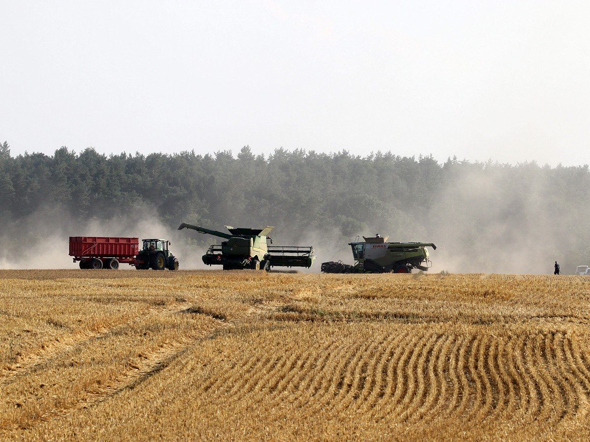 Weizenernte bei Gotthun in Mecklenburg